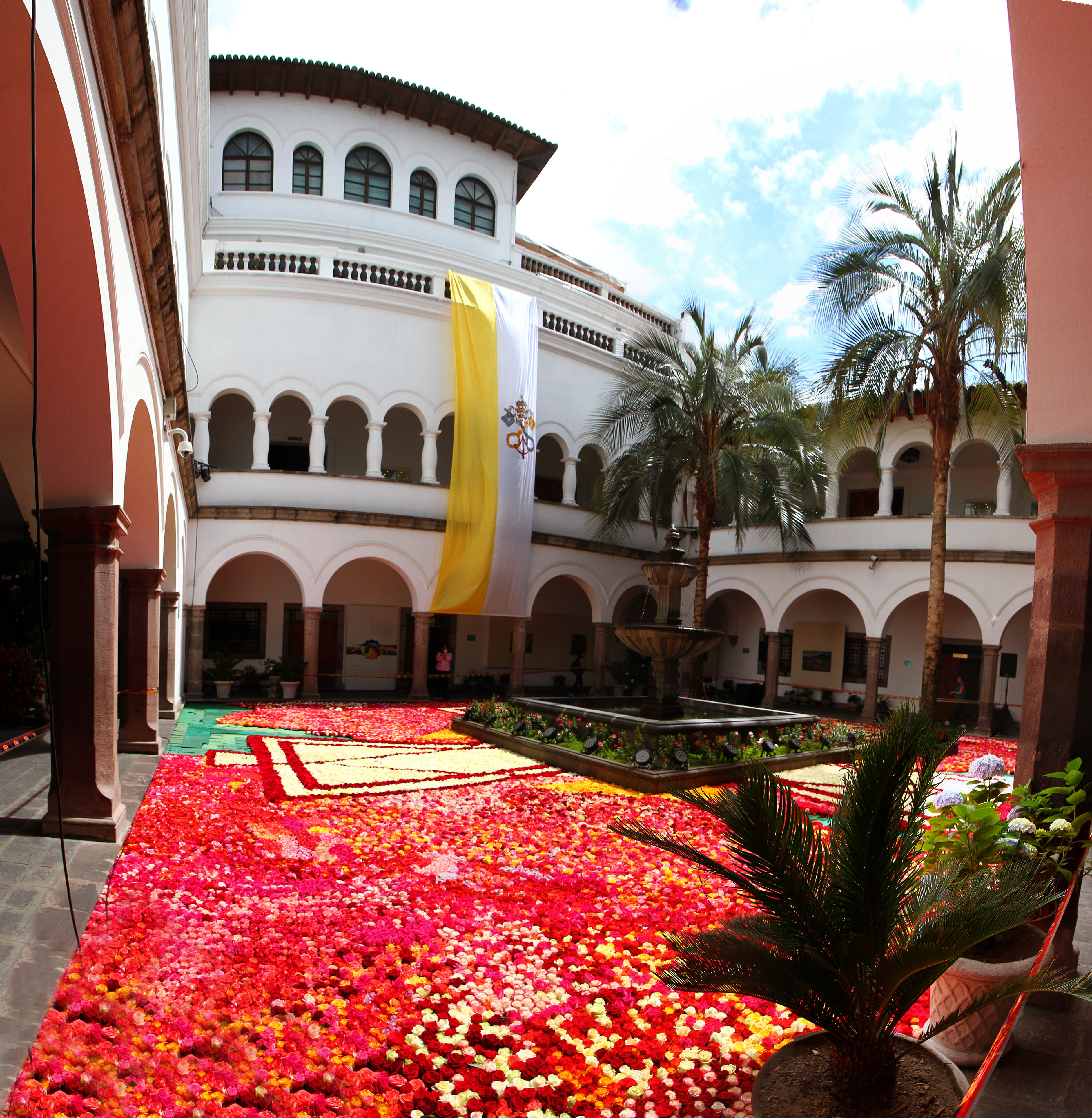 Quito 06 Jul (Andes).- Arreglo floral por motivo de la visita del papa Francisco, dentro del palacio de gobierno en el centro histórico, el Papa visitará Carondelet esta noche. Fotografías: Carlos Rodríguez/Andes